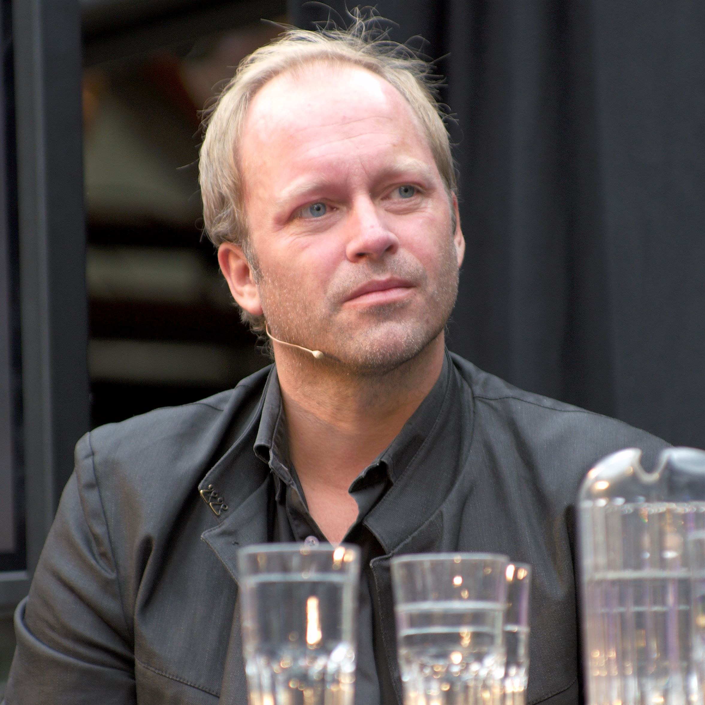 Jens M. Johansson at Oslo bokfestival 2011.